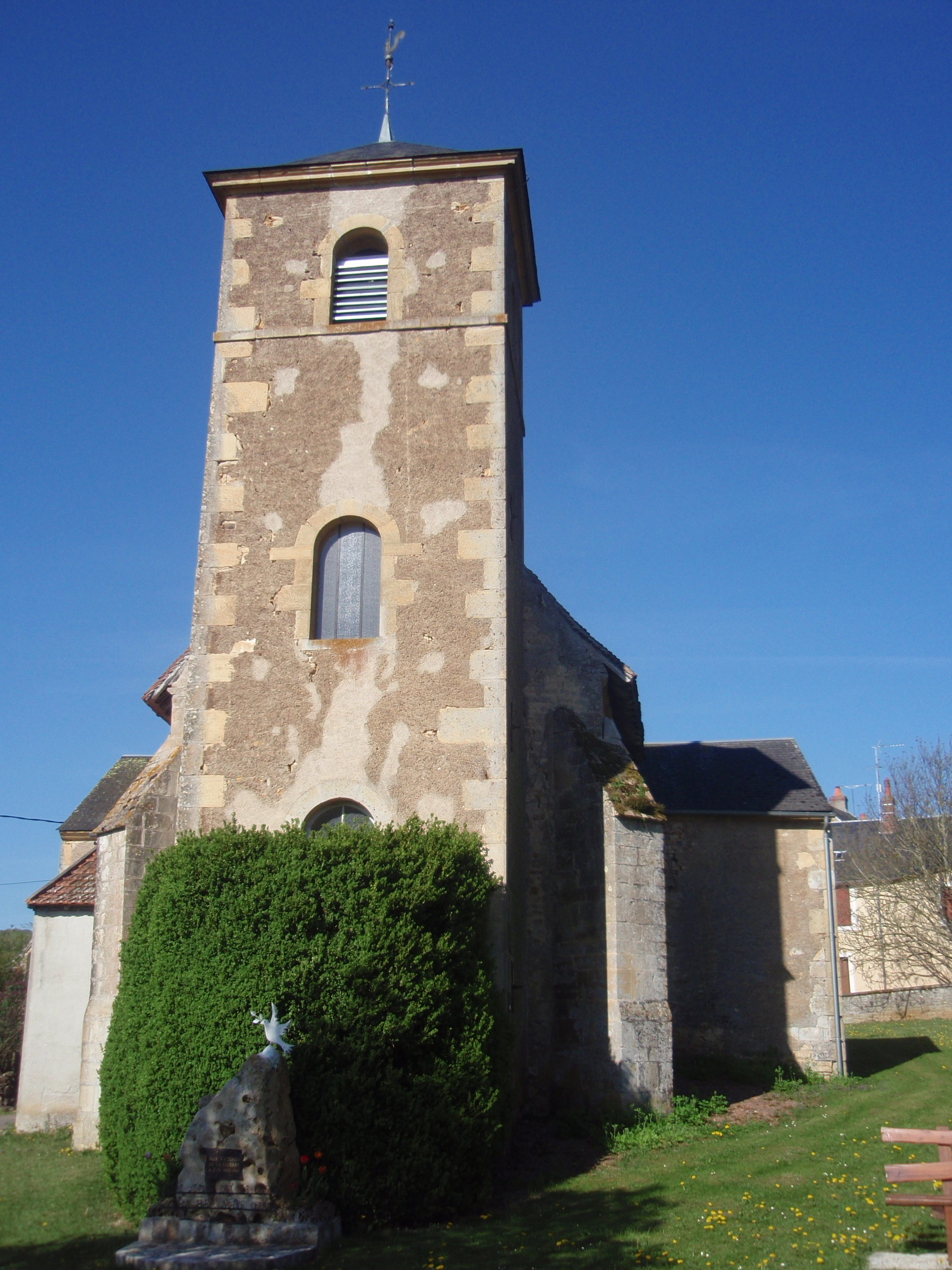 Vue extérieure de l'église de Saint-Benin-des-Bois (Nièvre).